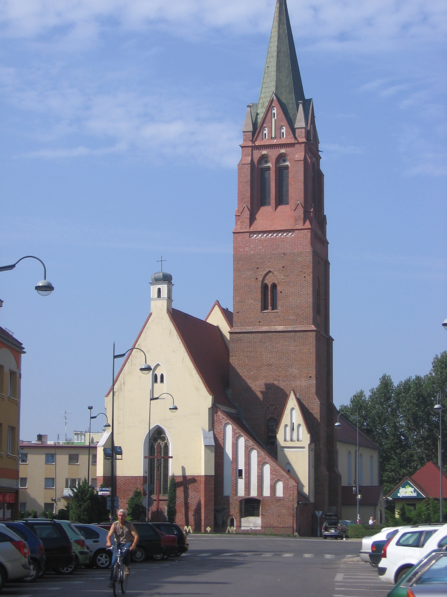 kościół pod wezwaniem Matki Boskiej Pocieszenia w Oławie, pl. Św. Maksymiliana M. Kolbe 1 - widok z Rynku (zabytek 15/A/00)